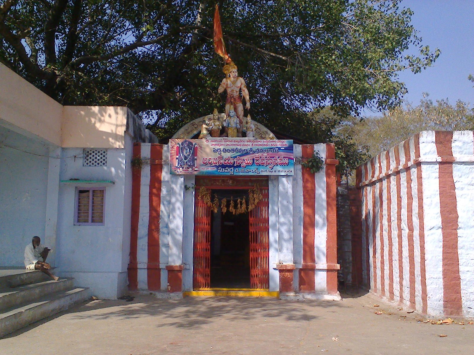 చింతరేవుల ఆంజనేయస్వామి ఆలయం